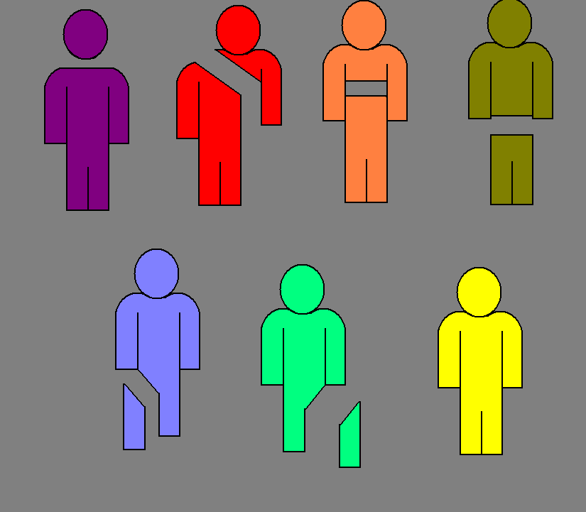 6구의 시체로 7구의 시체를 만드는 트릭 설명용